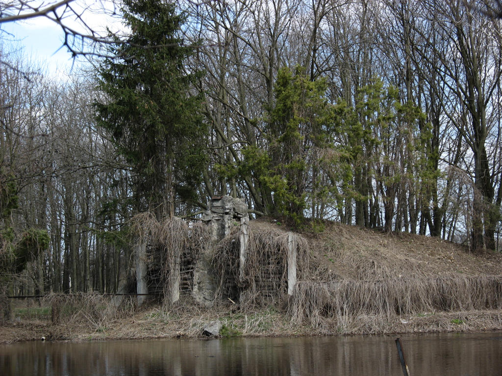 Альпійська гірка в Криворудському дендропарку